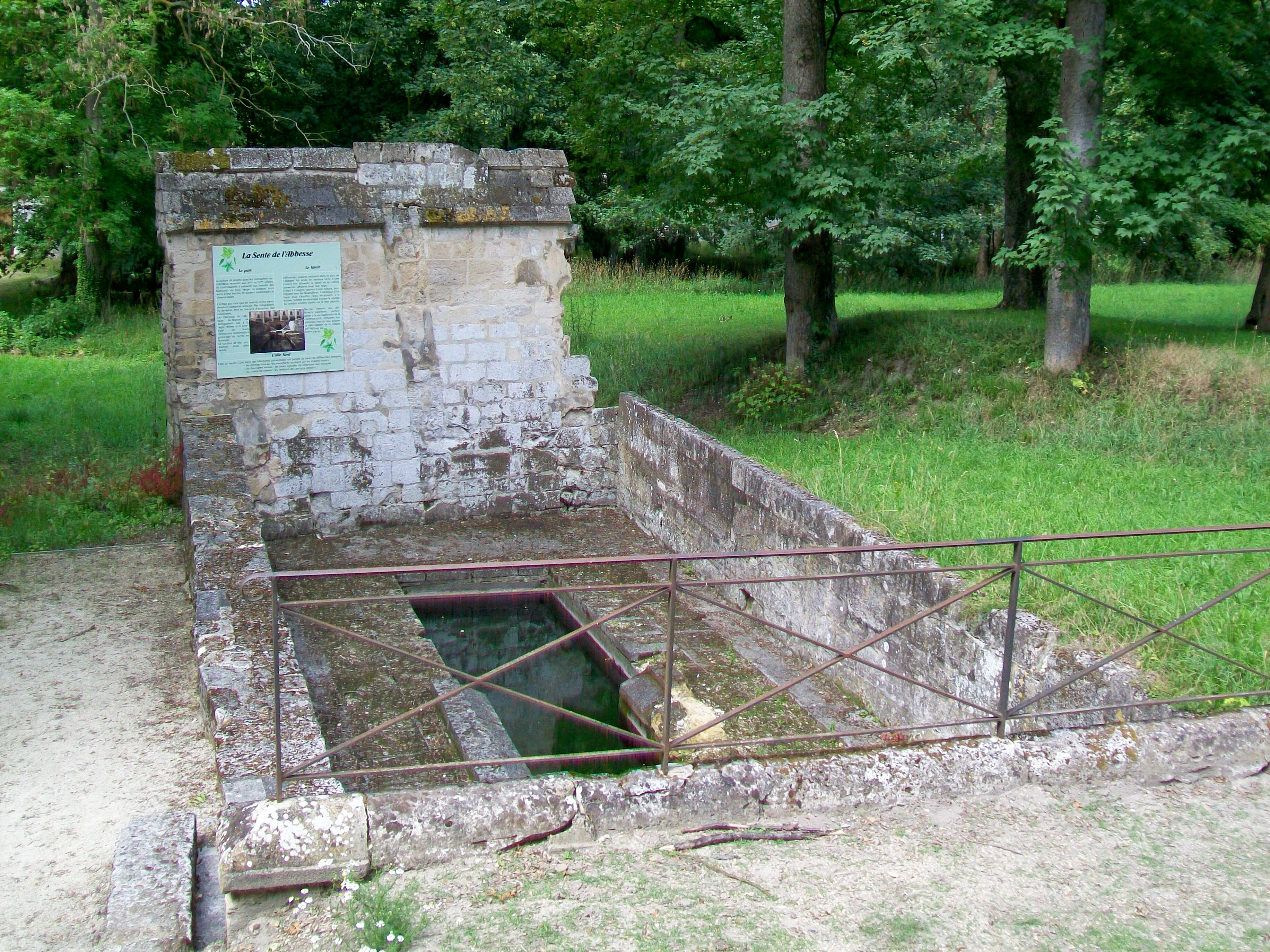 Le lavoir de l'abbaye, au nord ; il aurait été jadis couvert et chauffé. Le lavoir est alimenté une fontaine couverte à son extrémité sud, non visible sur la photo. Inscrit M.H. en 1933, indépendamment de l'abbaye.